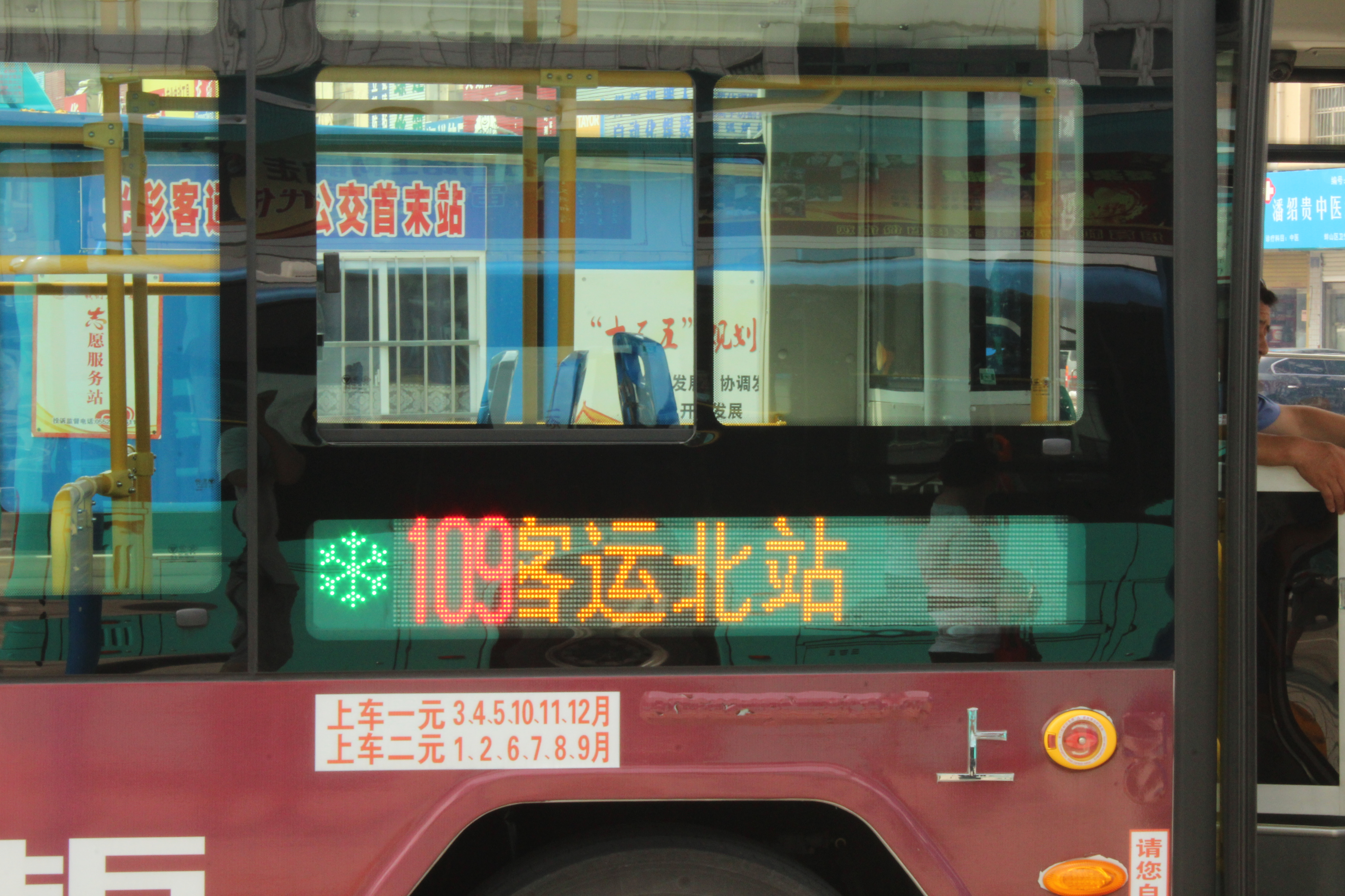 中文（中国大陆）: Bengbu Bus No.109 LED Plate